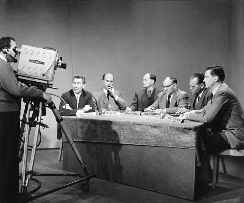 Fernsehstudio Köln Journalistengespräch über die Saarfrage. Die Bundestagsabgeordneten Trittelvitz (SPD) und Eugen Gerstenmaier (CDU) stellten sich dem Kreuzfeuer von vier Journalisten.